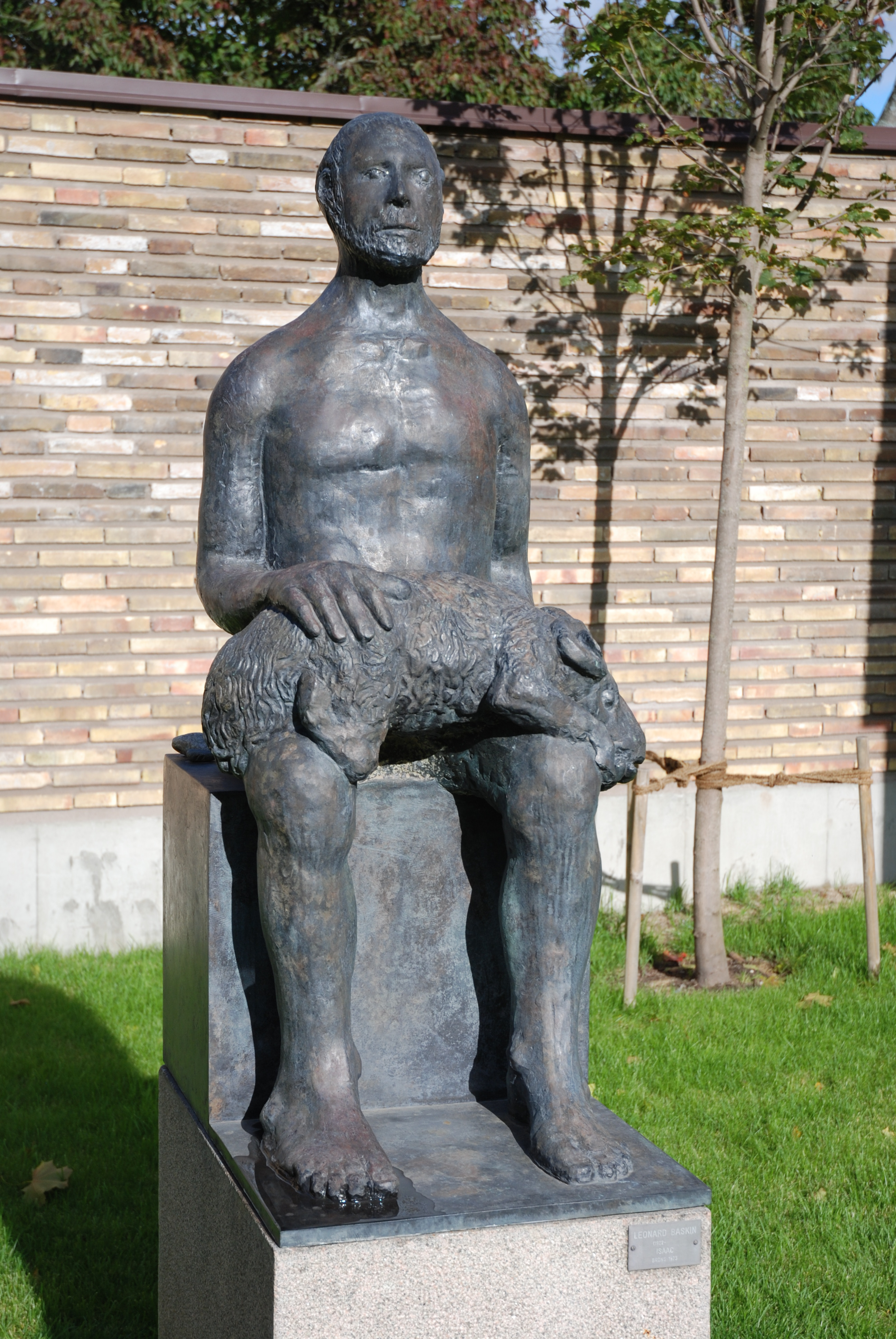 Leonard Baskin´s Isak, Marabouparken, Sundbyberg, Sweden